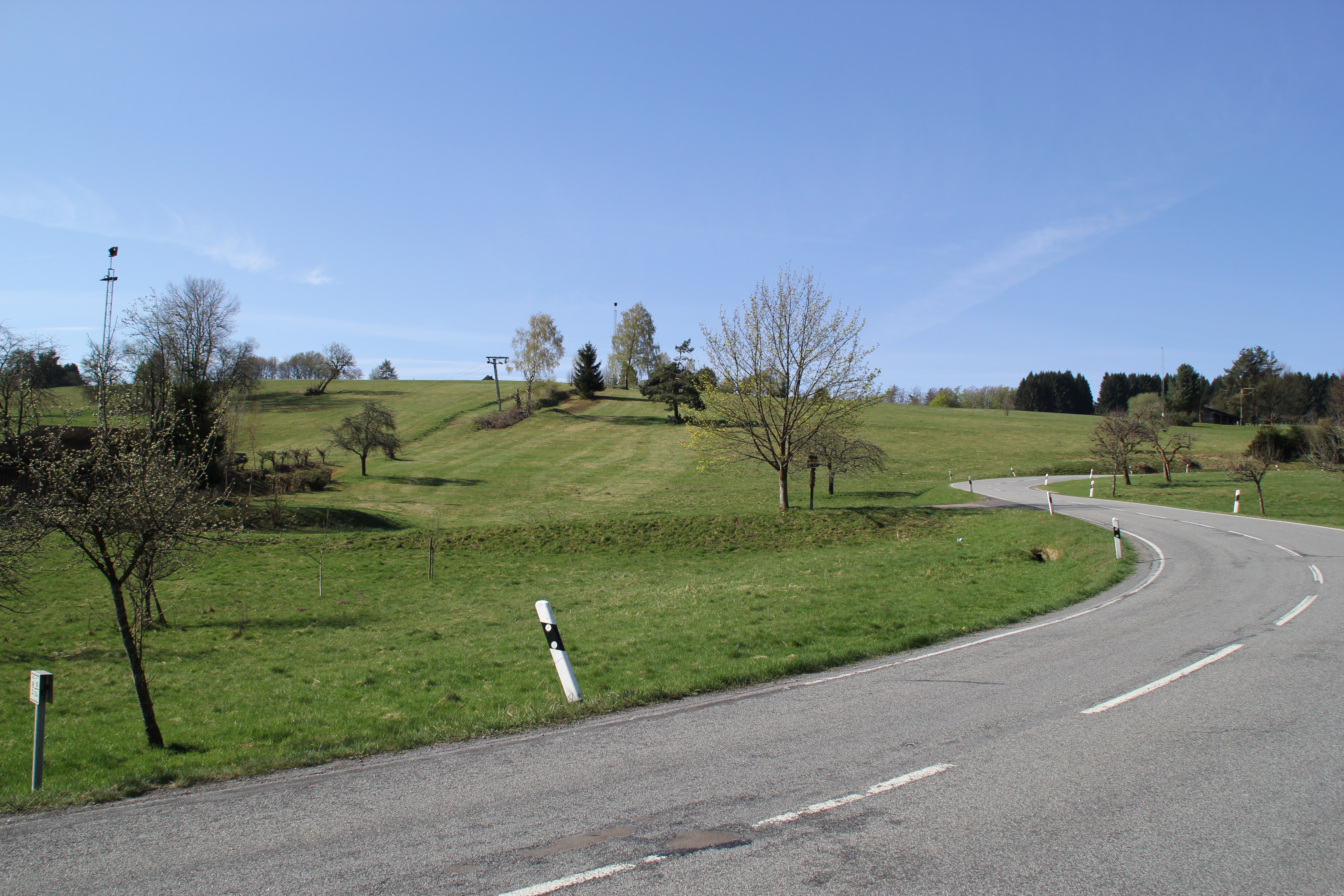 Skipiste am Engländer bei Jakobsthal im April